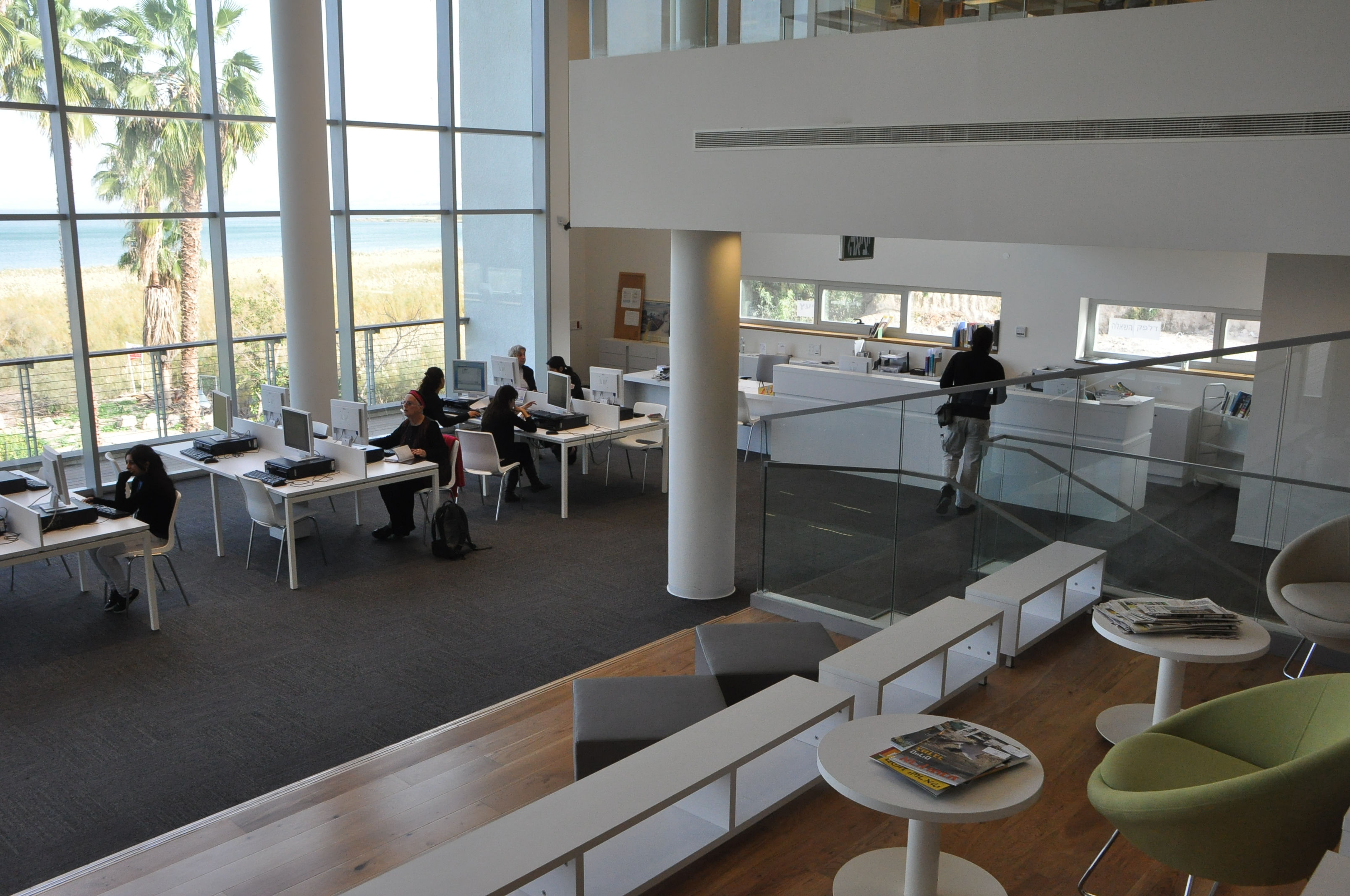 אזור היעץ בספרייה ודלפק ההשאלה